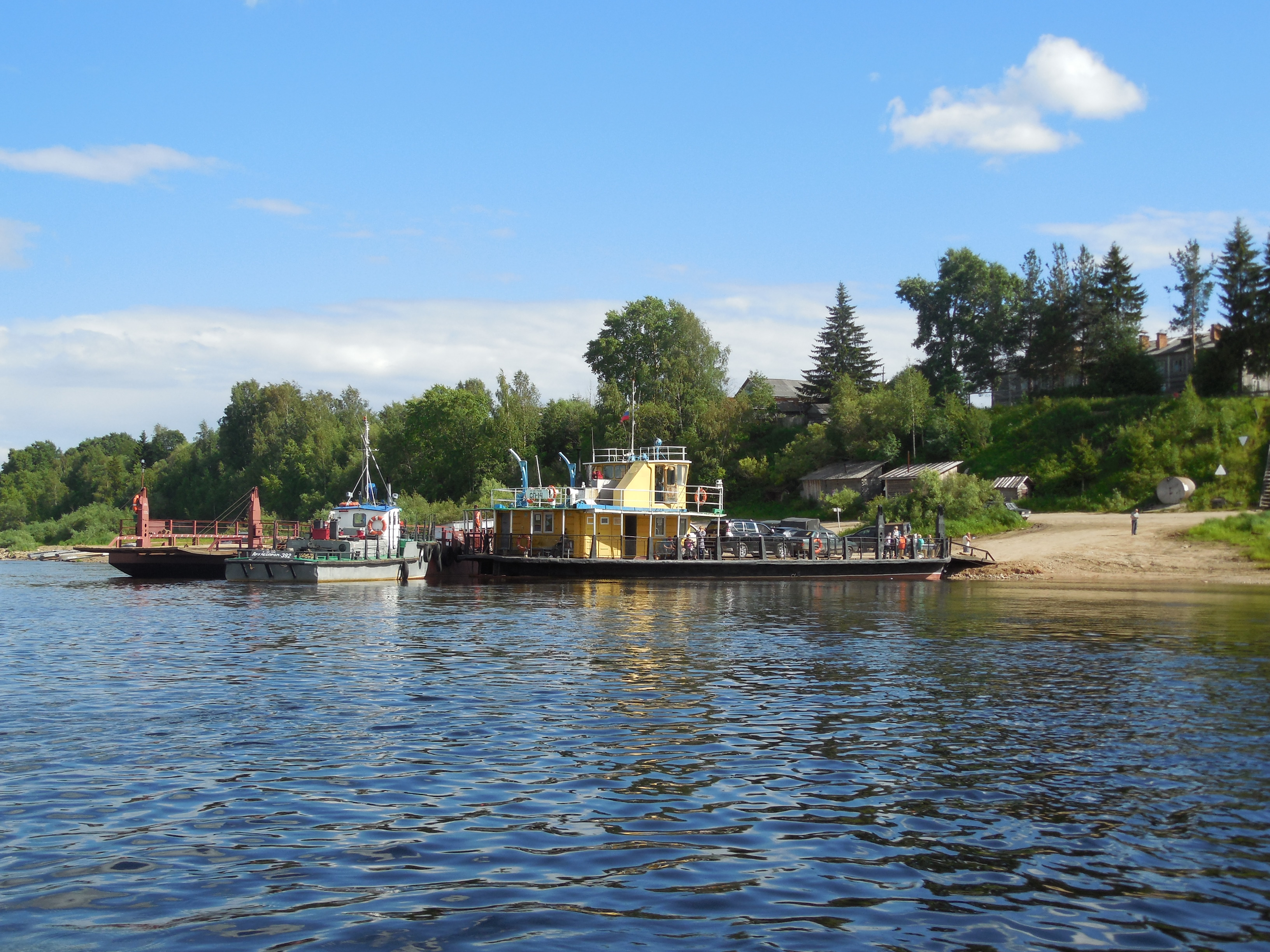 Motorboat by Verkhnaya Dvina, Kotlas - Toima